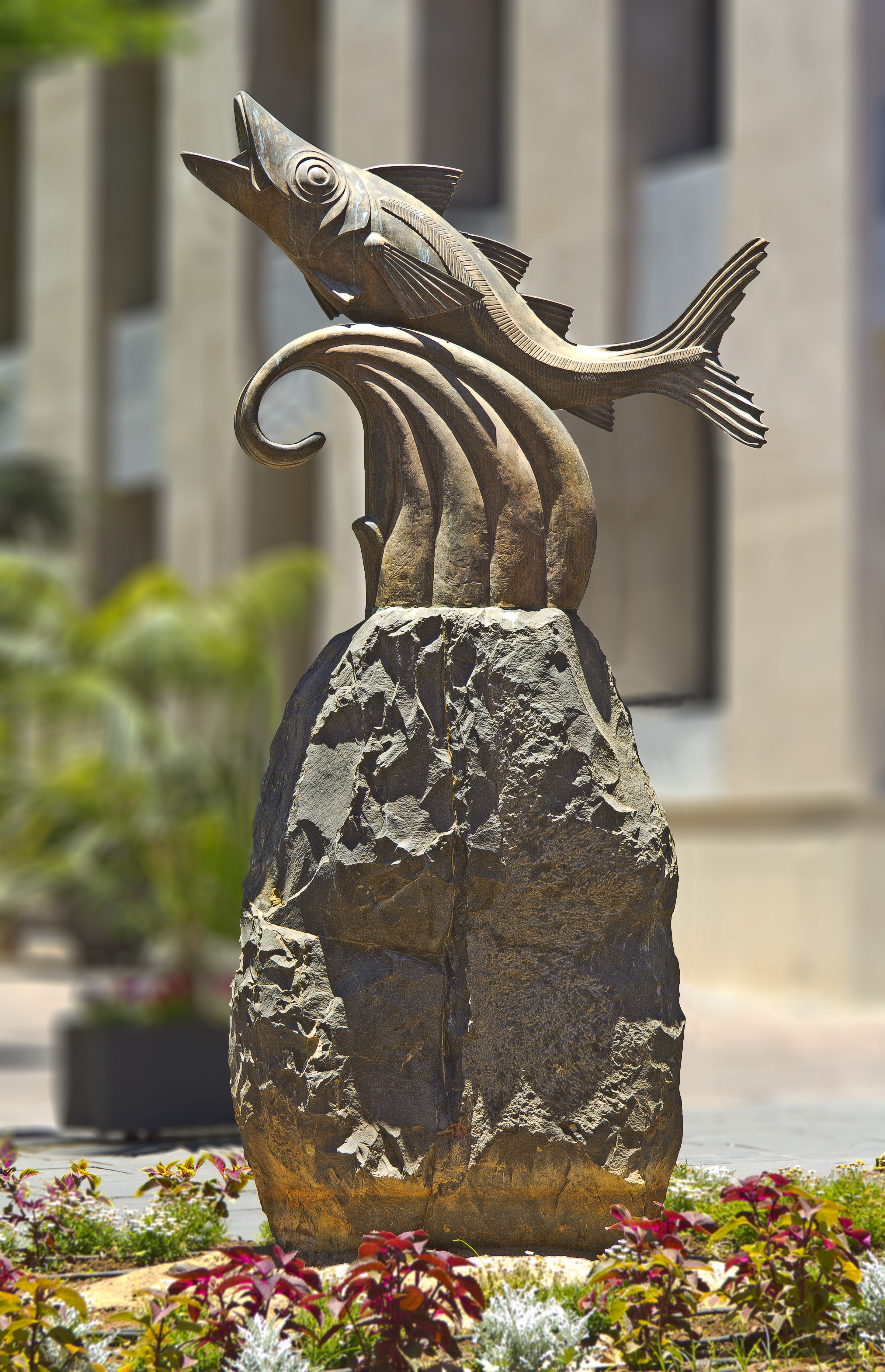 Die Bronzefigur einer Bastardmakrele “El Chicharro“ gilt als Symbolfigur für die Einwohner von Santa Cruz de Tenerife (los chicharreros). Die Plastik steht auf der „Plaza del Chicharro“ im Zentrum von Santa Cruz de Tenerife in Spanien. Die Plastik wurde von Francisco Javier Rodríguez de Armas und Evelina Martín Rodríguez geschaffen und befindet sich seit dem Jahr 2003 an ihrem heutigen Platz.